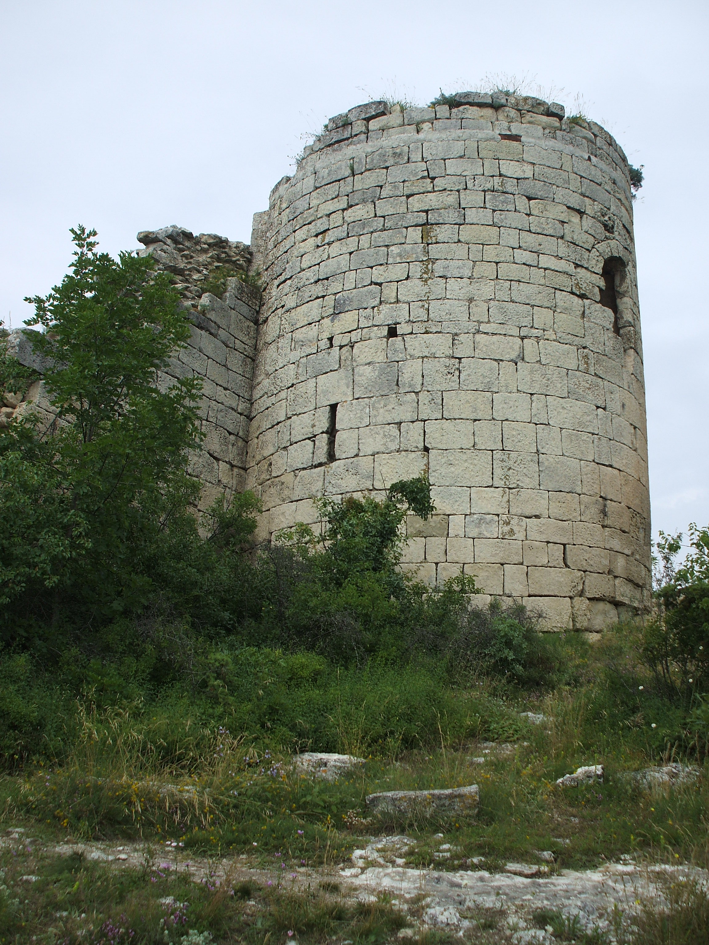 Сюренская крепость, Крым.